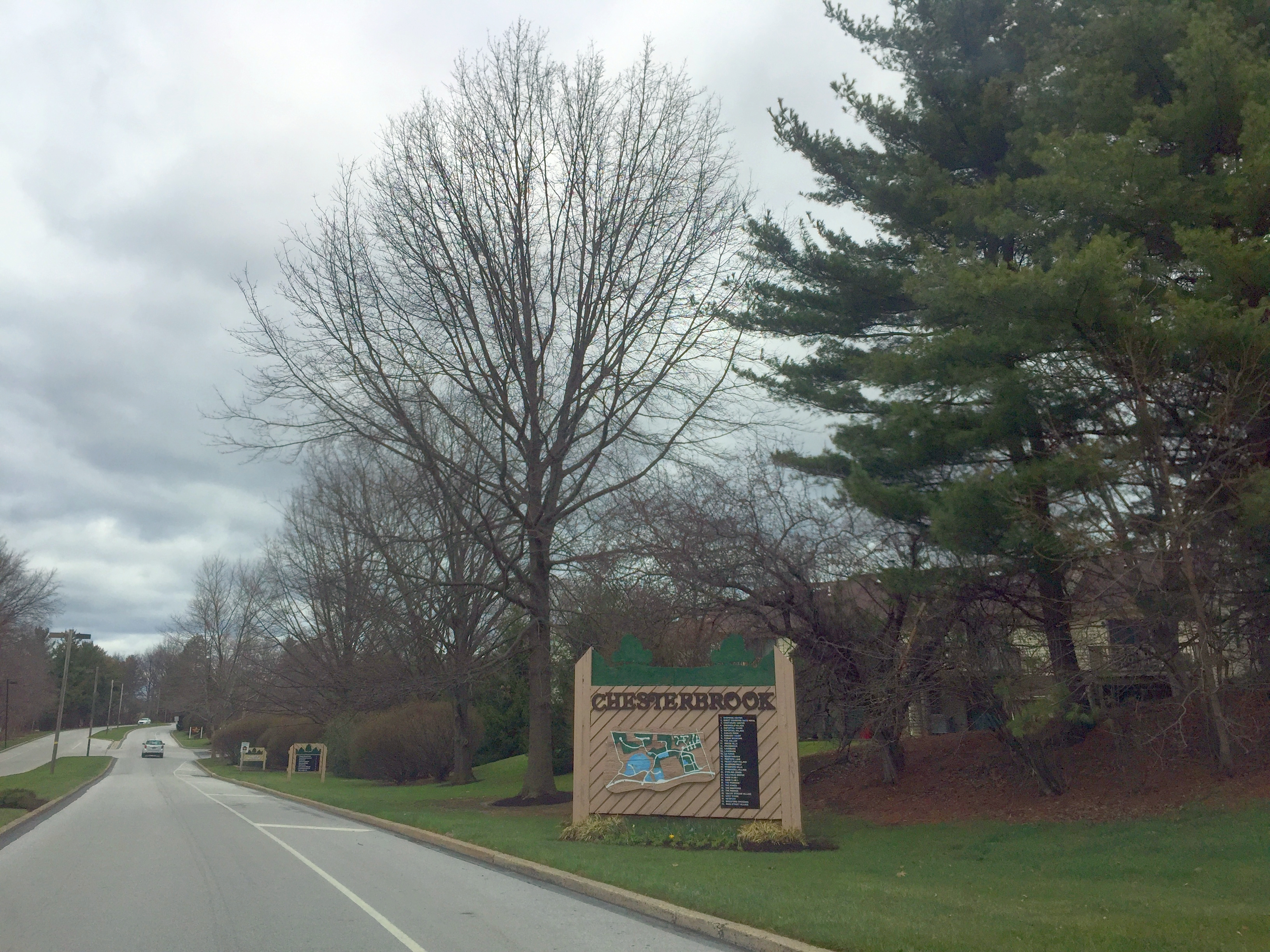 Chesterbrook sign